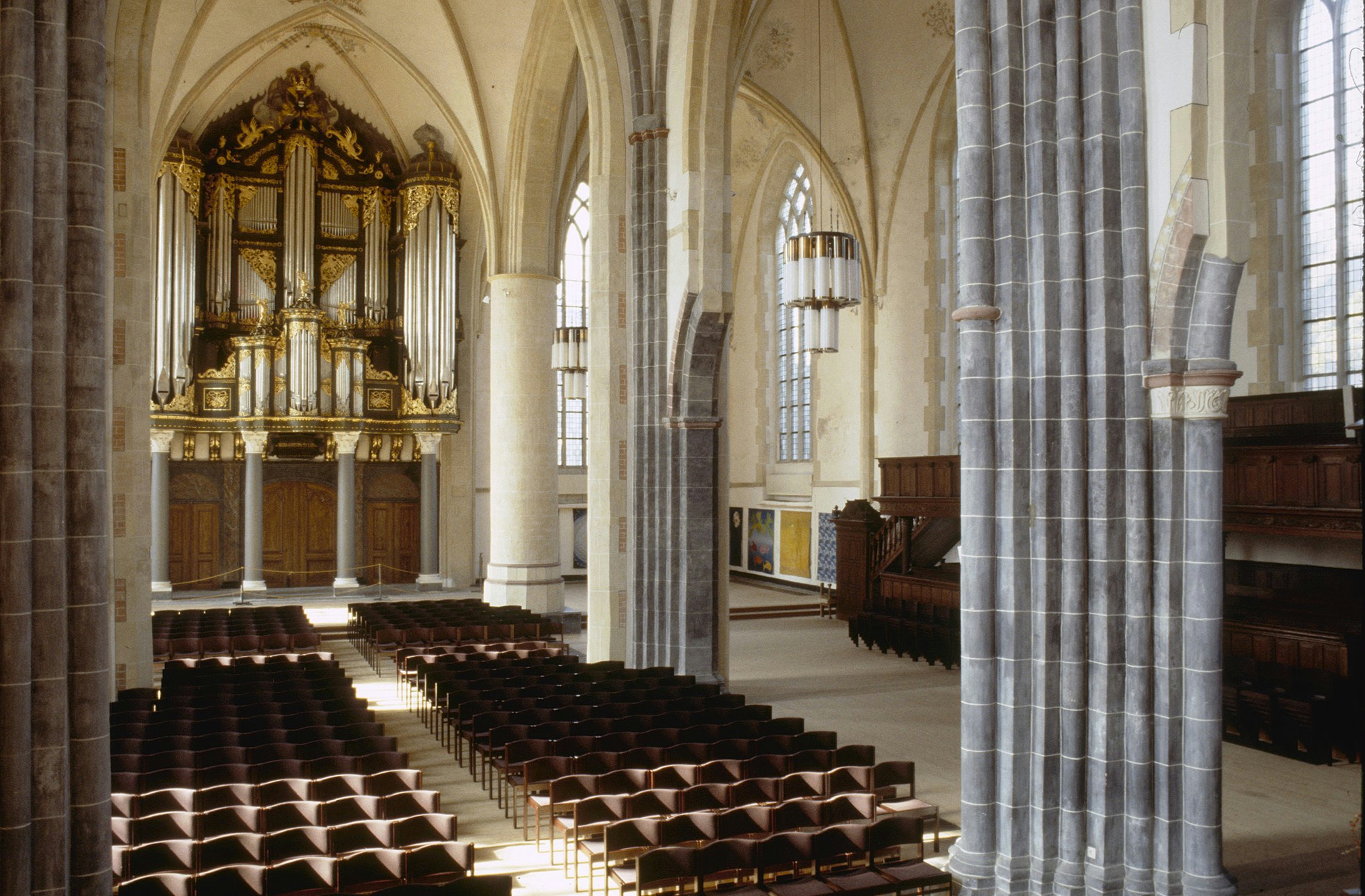 Martinikerk: INTERIEUR, OVERZICHT NAAR HET NOORDWESTEN